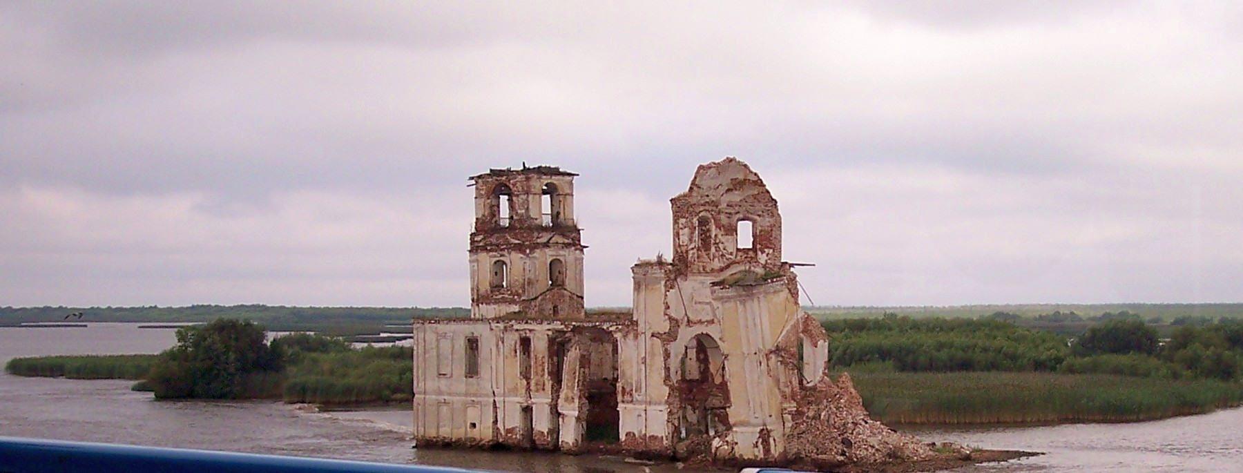 Eine Kirchenruine erhebt sich aus der aufgestauten Scheksna, die an dieser Stelle den weißen See verläßt. andere Versionen